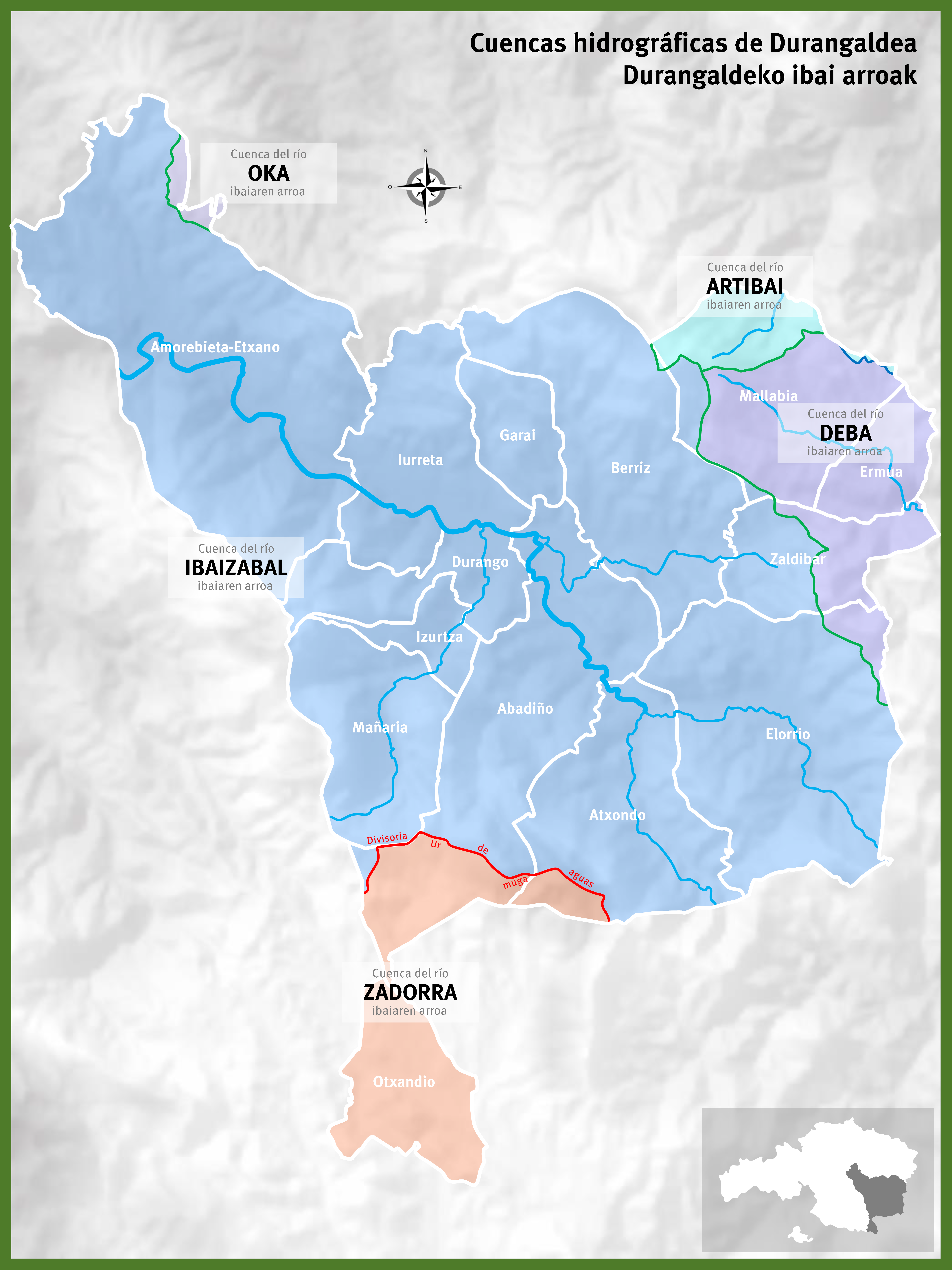 Cuencas hidrográficas de Durangaldea